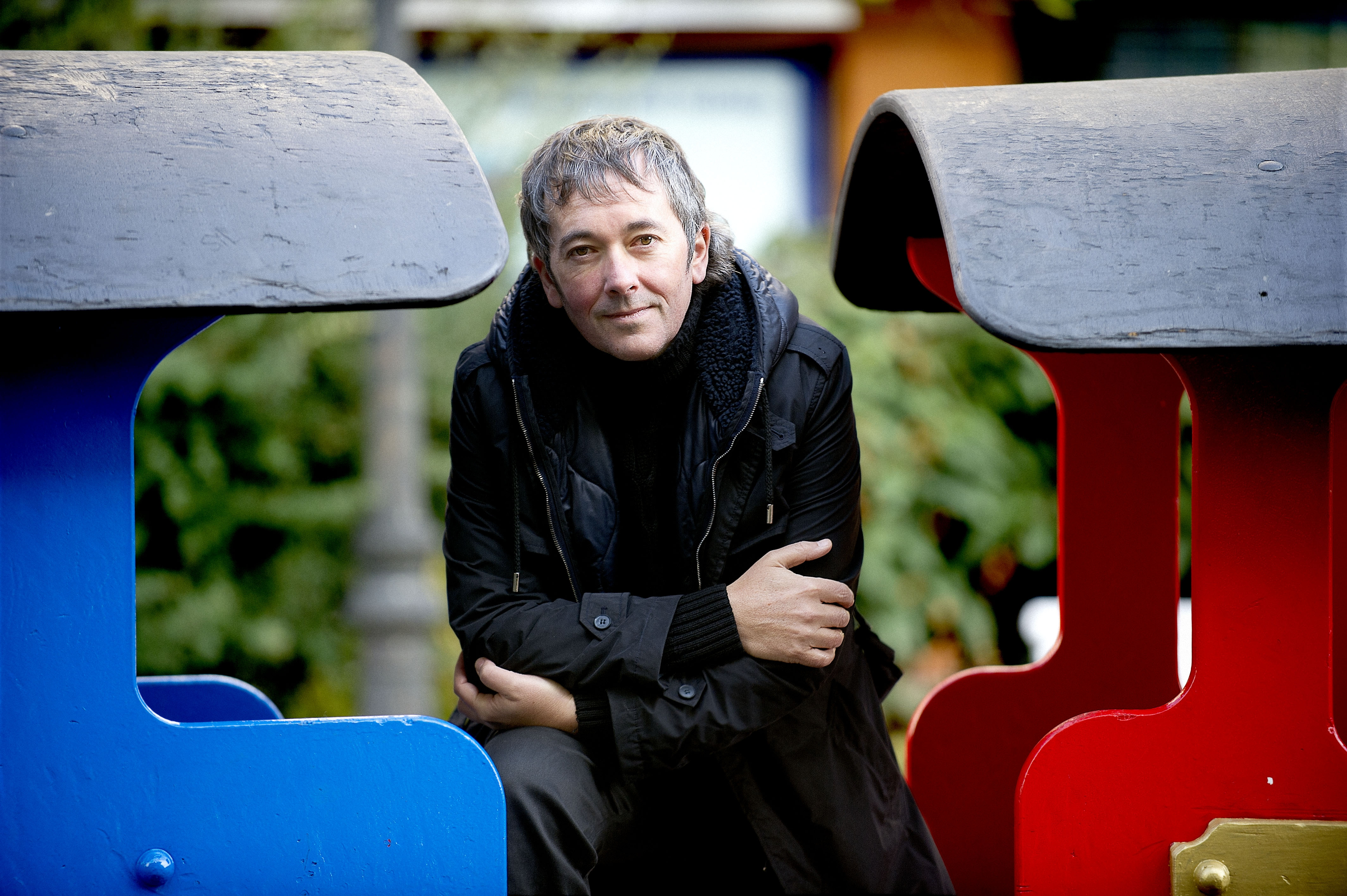 Patxi Zubizarreta idazlea.